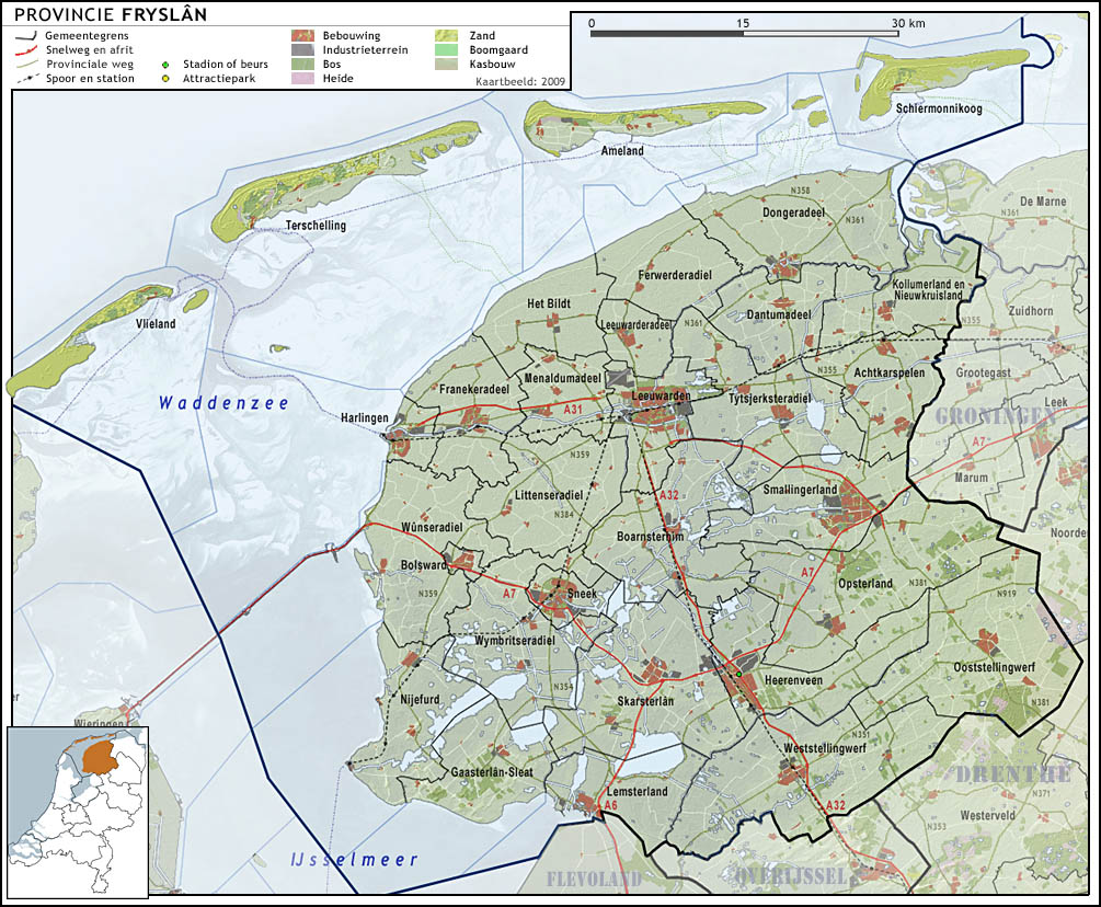 Provincie Fryslân (Friesland), met indeling van gemeenten (2009) en impressie van het landschap. Door Jan-Willem van Aalst, samengesteld uit publiek beschikbare geo-data: Referentie-ondergrond (kustlijn, steden, wegen) gerasterd uit de OpenStreet Map OSM. ( Inhoud is beschikbaar onder de Creative Commons Attribution-ShareAlike 3.0 license. Referentie-ondergrond op water bewerkt vanuit Gebruik is vrij met bronvermelding NLR en ESA. Vectorgrenzen van gemeenten en regio's vrij ter beschikking gesteld met dank aan cartografen van brandweerregio's Hollands-Midden en IJsselland; gerasterd in Photoshop. Hoogte-aanduidingen (reliëf) gerasterd uit de AHN Viewer ( gebruik is vrij met bronvermelding (c) AHN, Overige kenmerken op de kaart: eigen tekenwerk van Jan-Willem van Aalst, op basis van gerasterde gemeentegrenzen.